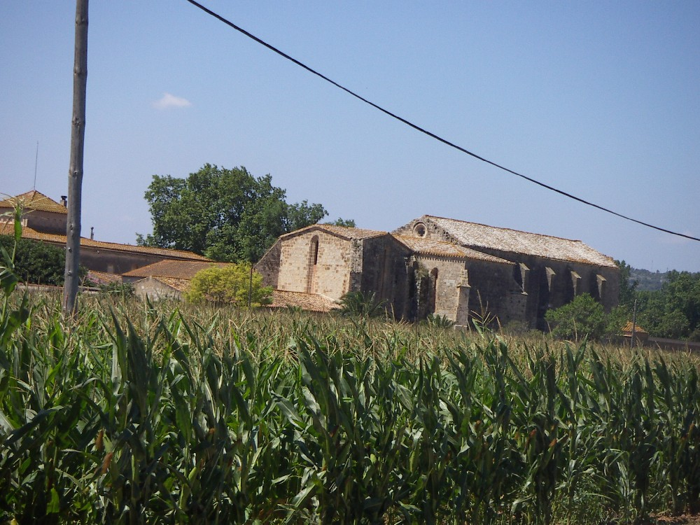 conjunt monumental del monestir cistercenc de Sant Feliu de Cadins a Cabanes (Alt Empordà)